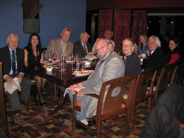 A l'arrière-plan, de gauche à droite : Ben Stoltzfus - X - Roger-Michel Allemand - Renato Barilli - Michel Sirvent - X. Au premier plan, de gauche à droite : Tony Chadwick - X - Bernard Valette - X.